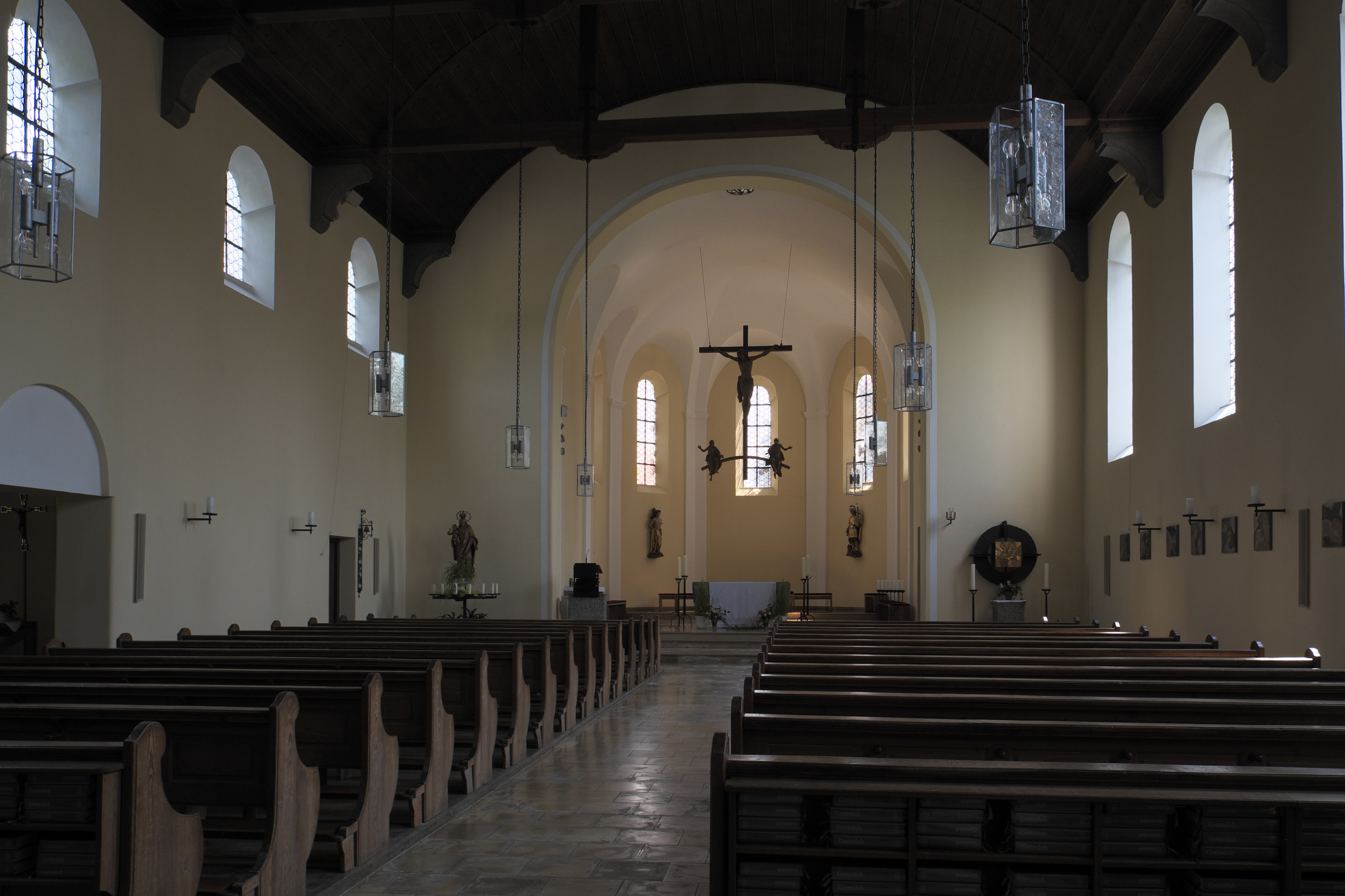 Katholische Pfarrkirche Zu den Heiligen Schutzengeln in Eichenau im Landkreis Fürstenfeldbruck (Bayern/Deutschland), Innenraum